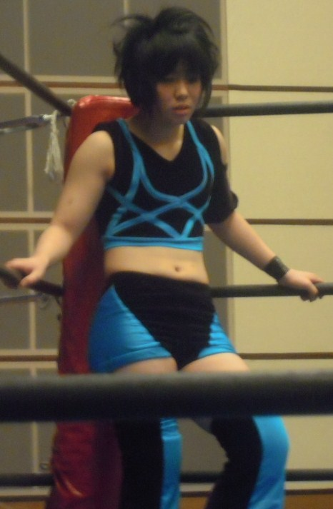 都宮ちい 2011年2月6日 アイスリボン名古屋・今池ガスホール大会 投稿者撮影